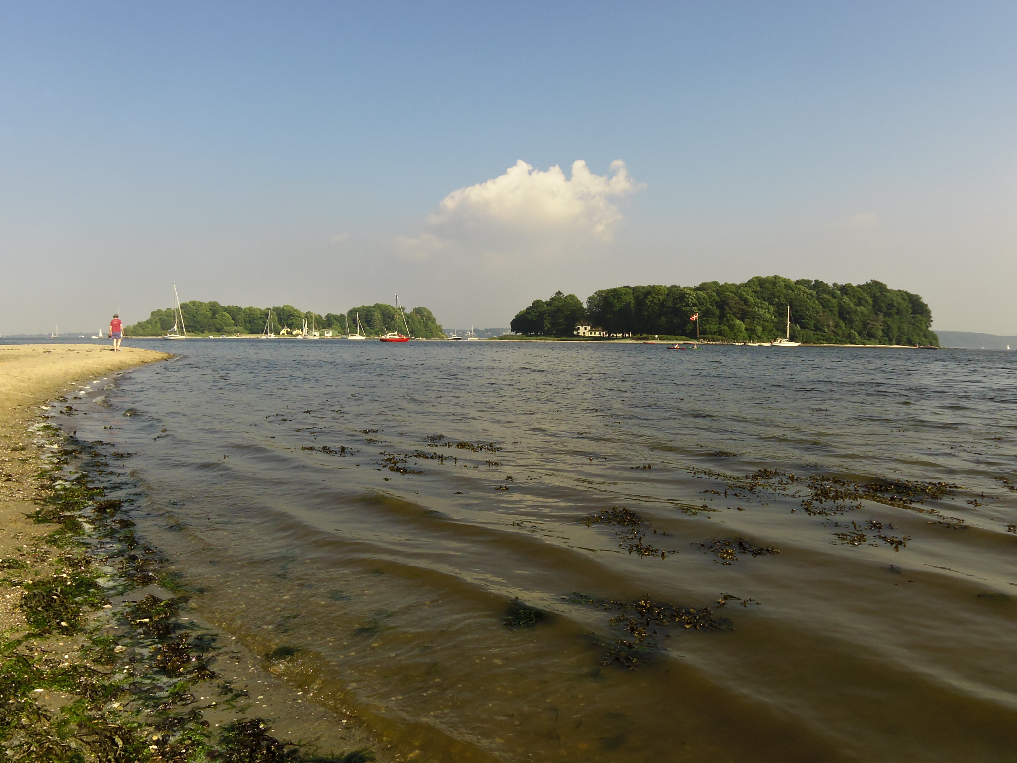 Okseøerne